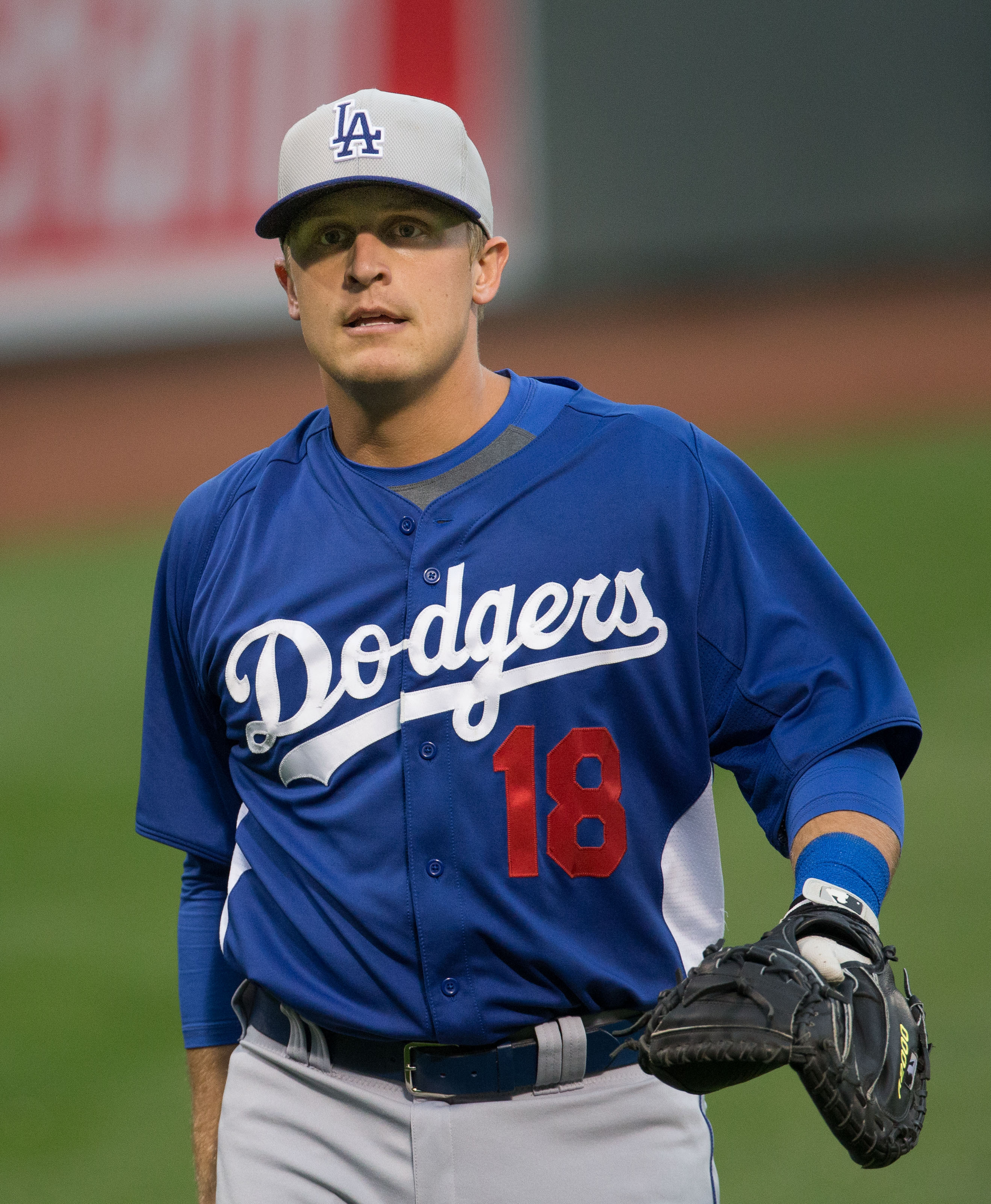 Los Angeles Dodgers catcher Tim Federowicz – Los Angeles Dodgers at Baltimore Orioles April 19, 2013